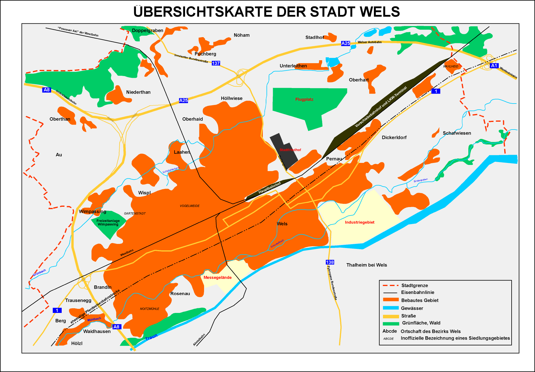 Überblickskarte der Stadt Wels